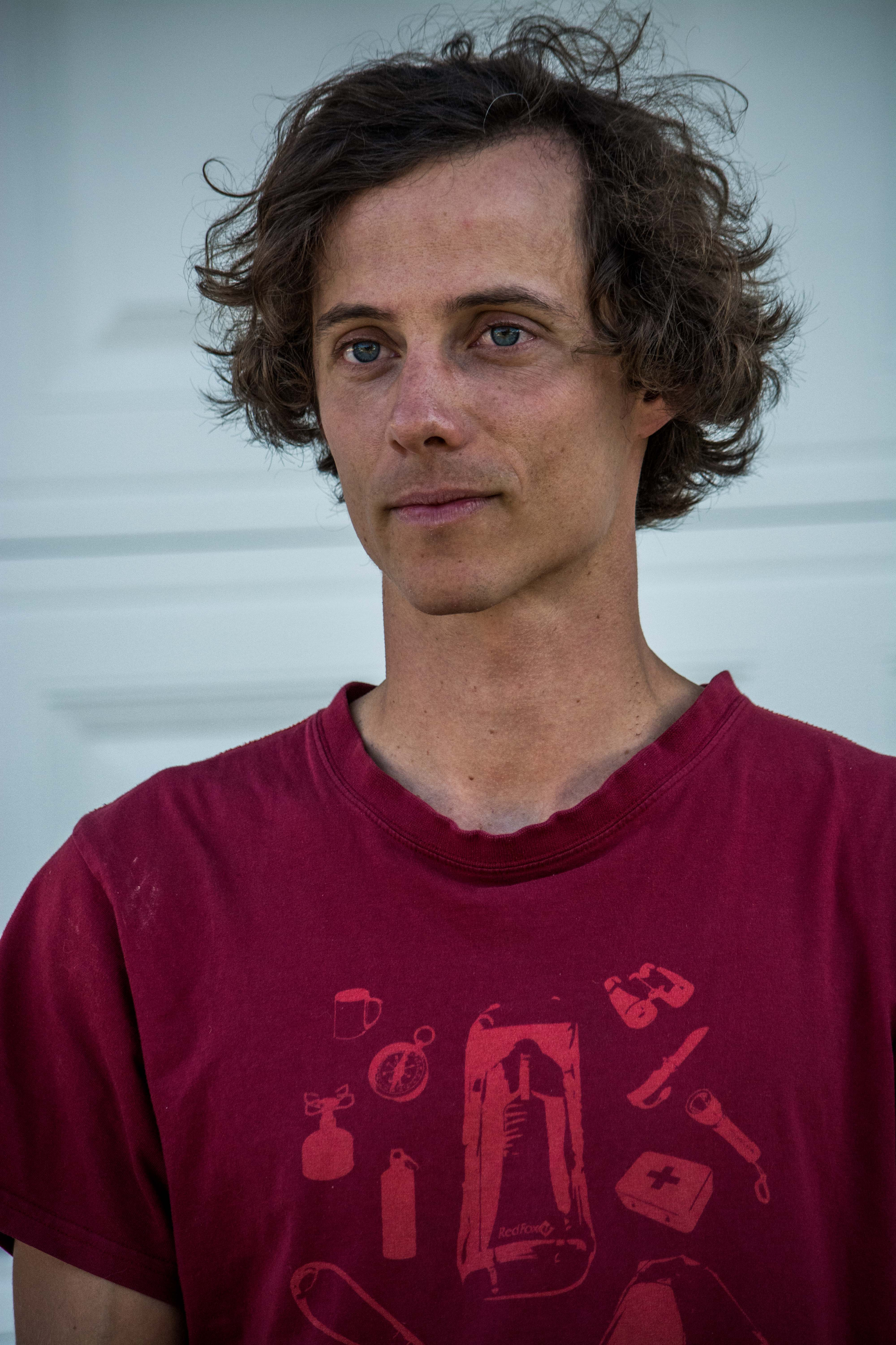 Friedrich Kühne 2018